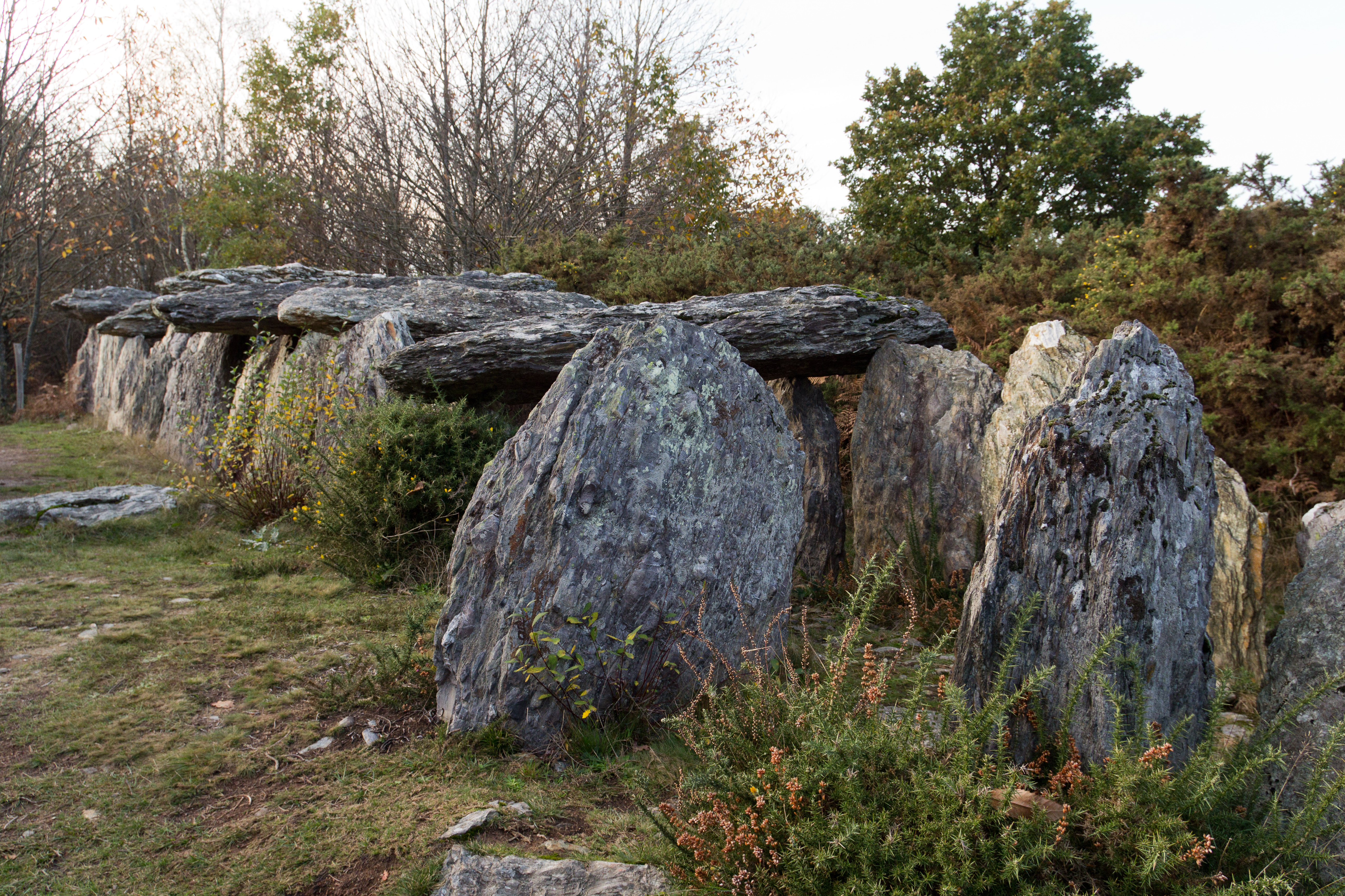 Entrée de l'allée couverte du Tréal.